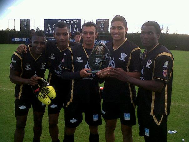 Primer titulo con el equipo de la media Colombia, la Copa Fortaleza